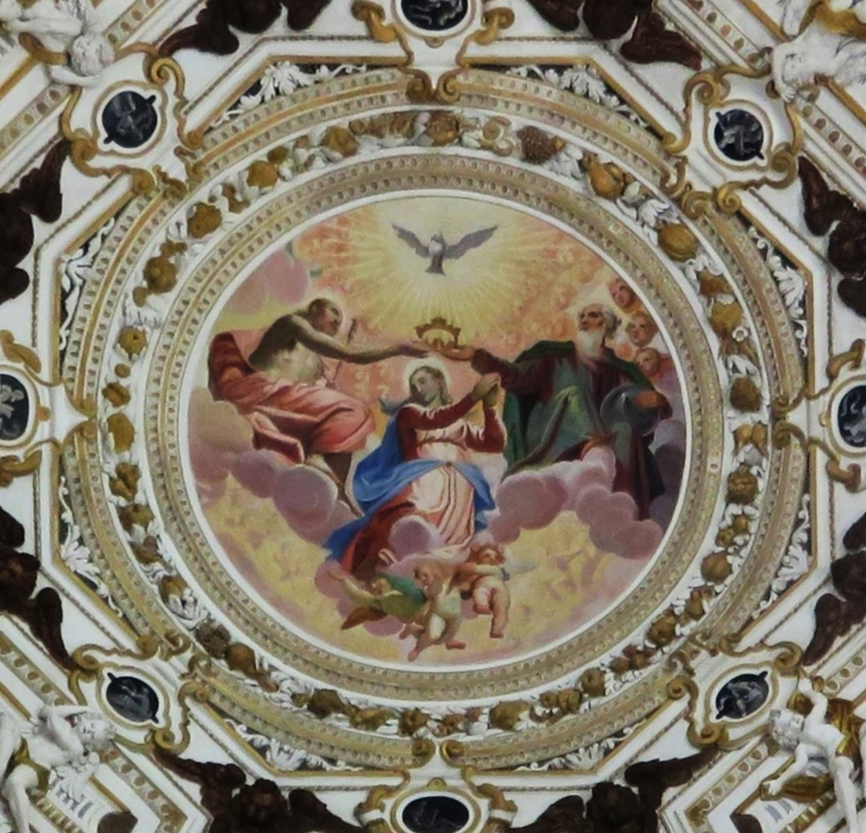 Cupola Chiesa dell'Inviolata - Riva del Garda - L'incoronazione di Maria in cielo, opera di Martino Teofilo Polacco.